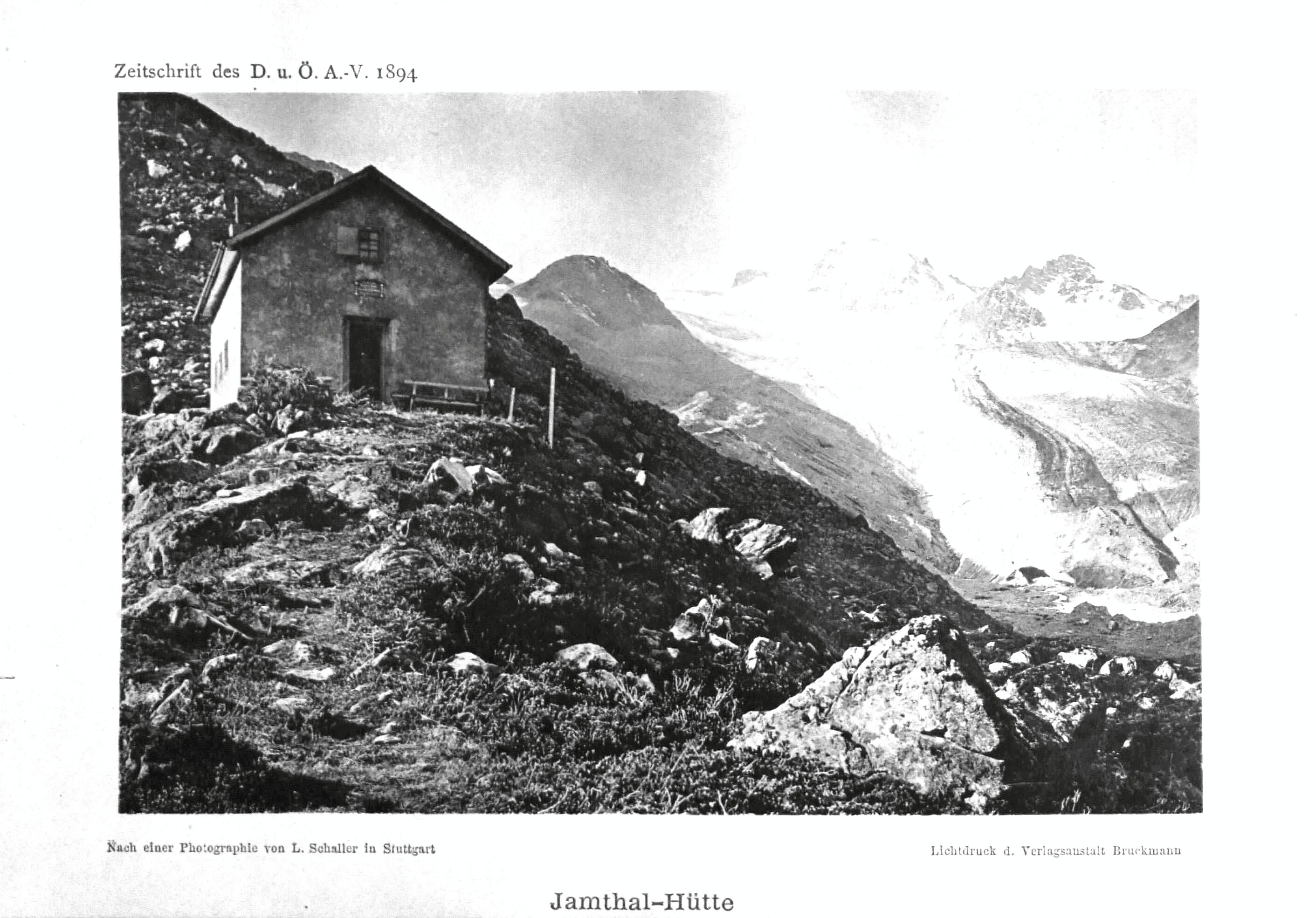 Jamthal-Hütte aus Zeitschrift des Deutschen und Oesterreichischen Alpenvereins 1894 Band 25